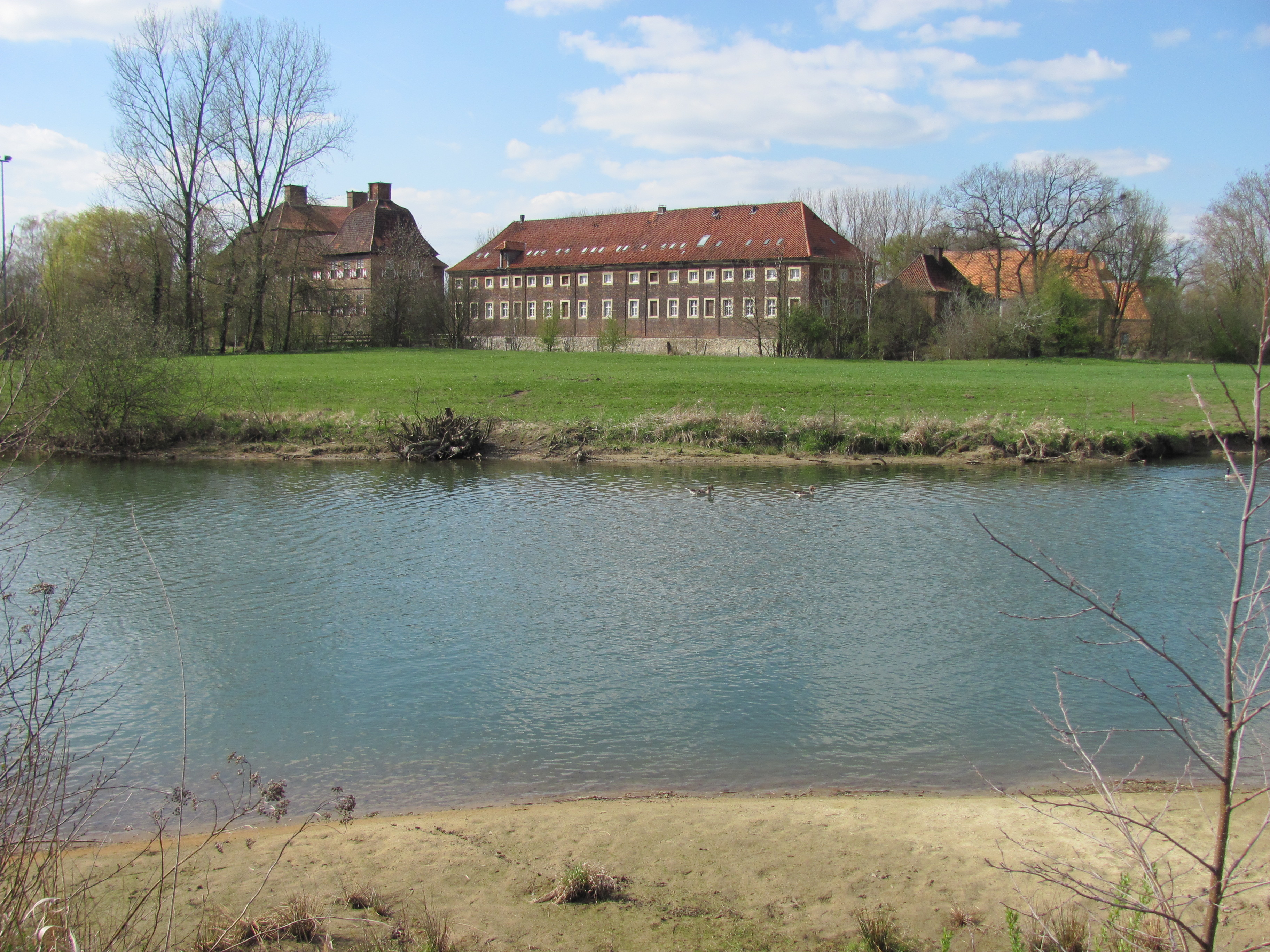 Schloss Oberwerries in Hamm-Heessen, Südseite mit Lippeufer – Die Lippe (etwa ab Flussmitte) und die Grünfläche bis zum Schloss liegen im Naturschutzgebiet „Lippeaue zwischen Schloss Oberwerries und Dolberg“ (NSG WAF-034) im Stadtgebiet von Ahlen (Kreis Warendorf). Das Südufer im Vordergrund gehört zum Naturschutzgebiet „Oberwerrieser Mersch“ (Stadtgebiet Hamm); die Lippe bildet hier die Gemeindegrenze.